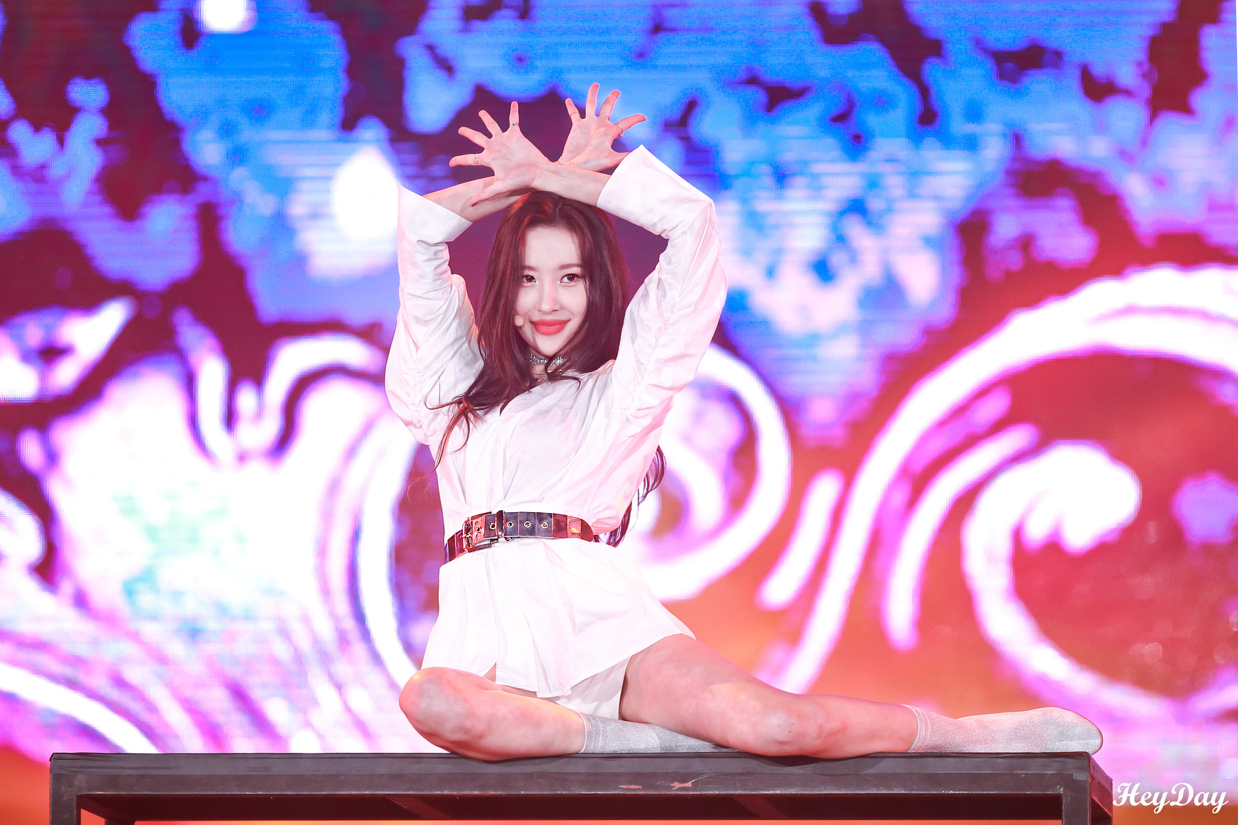 171001 코리아 뮤직 페스티벌 선미